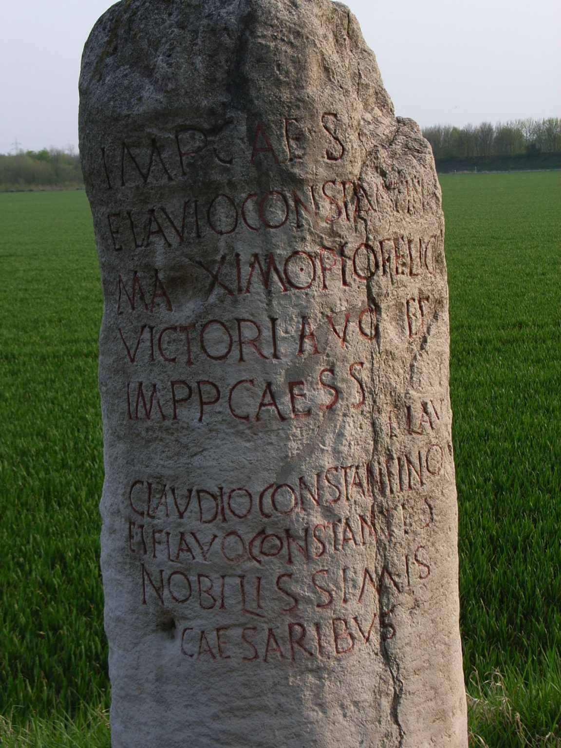 replikat eines römischen Meilensteins gefunden in Zülpich-Hoven, aufgestellt an der Sophienhöhe. Schillinger, 216: Imp(eratori) Caes(ari)/ Liciniano/ Licinio/ [I]nv(icto) Au(gusto)/ a c(olonia) A(grippinensium) l(eugas) XVI / Imp(eratori) Caes(ari) / Flavio Constantino/ Maximo Pio Felici/ Victori Aug(usto) et/ Impp(eratoribus) Caess(aribus) Flav(io)/ Iulio Crispo et F lav(io)/ Claudio Constantino/ et Flav(i)o Constantio/ nobilissimis / Caesaribus